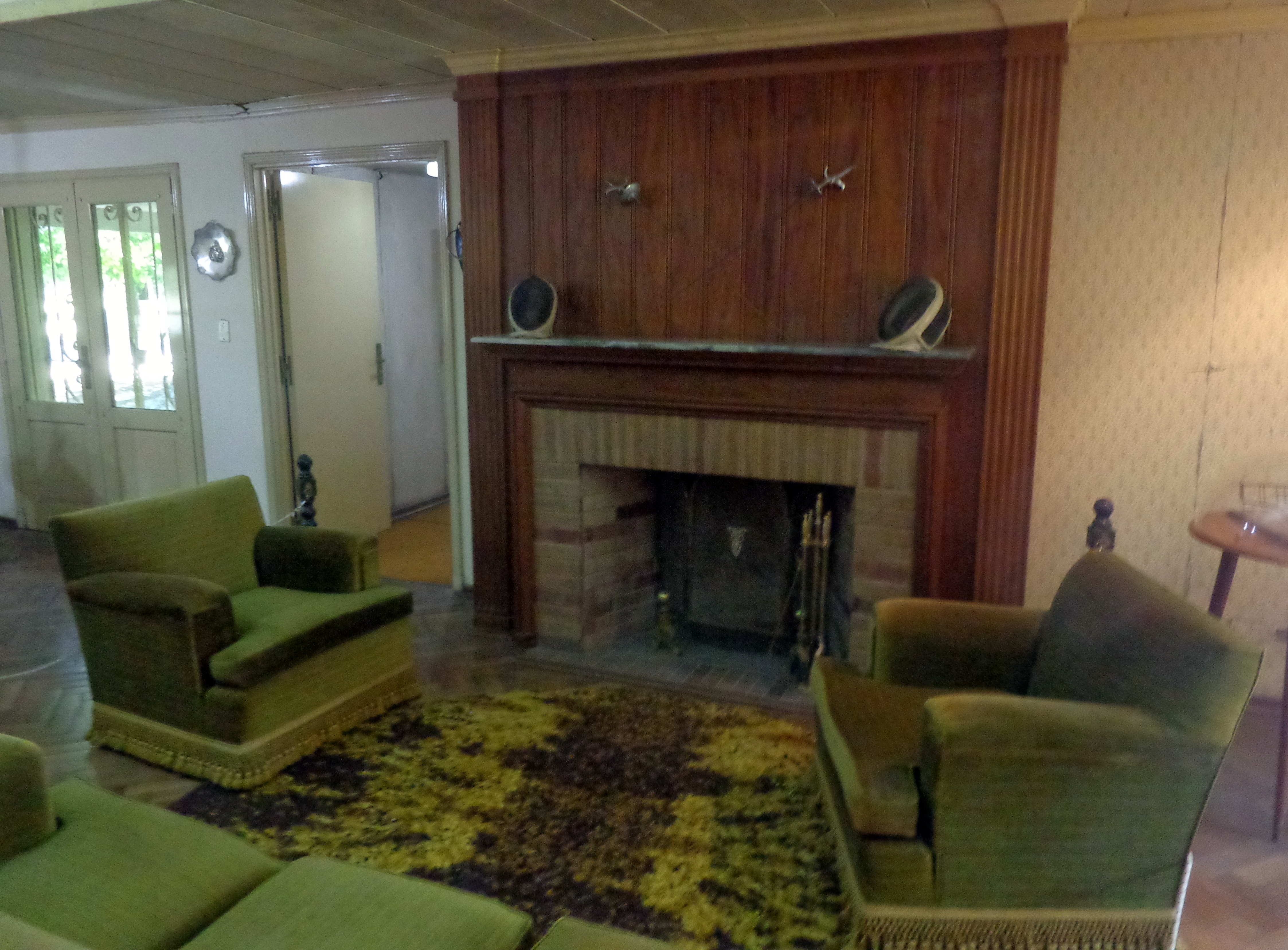 Quinta de San Vicente (oficialmente Museo Histórico "17 de Octubre") ex residencia del presidente argentino Juan Domingo Perón, la cual adquirió antes de alcanzar la presidencia.​ San Vicente, provincia de Buenos Aires, Argentina. En ella se encuentran los restos del mismo Juan Domingo Perón.